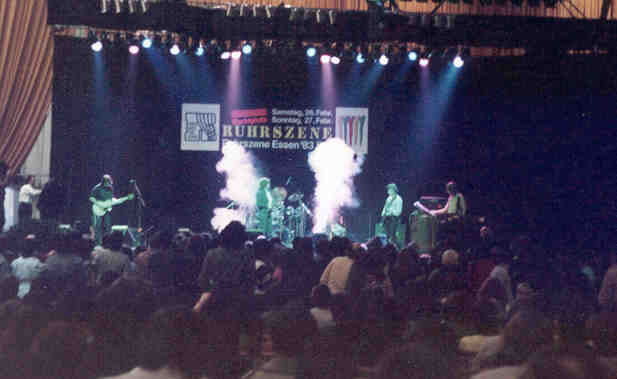 Saris Live 1983 Essener Grugahalle